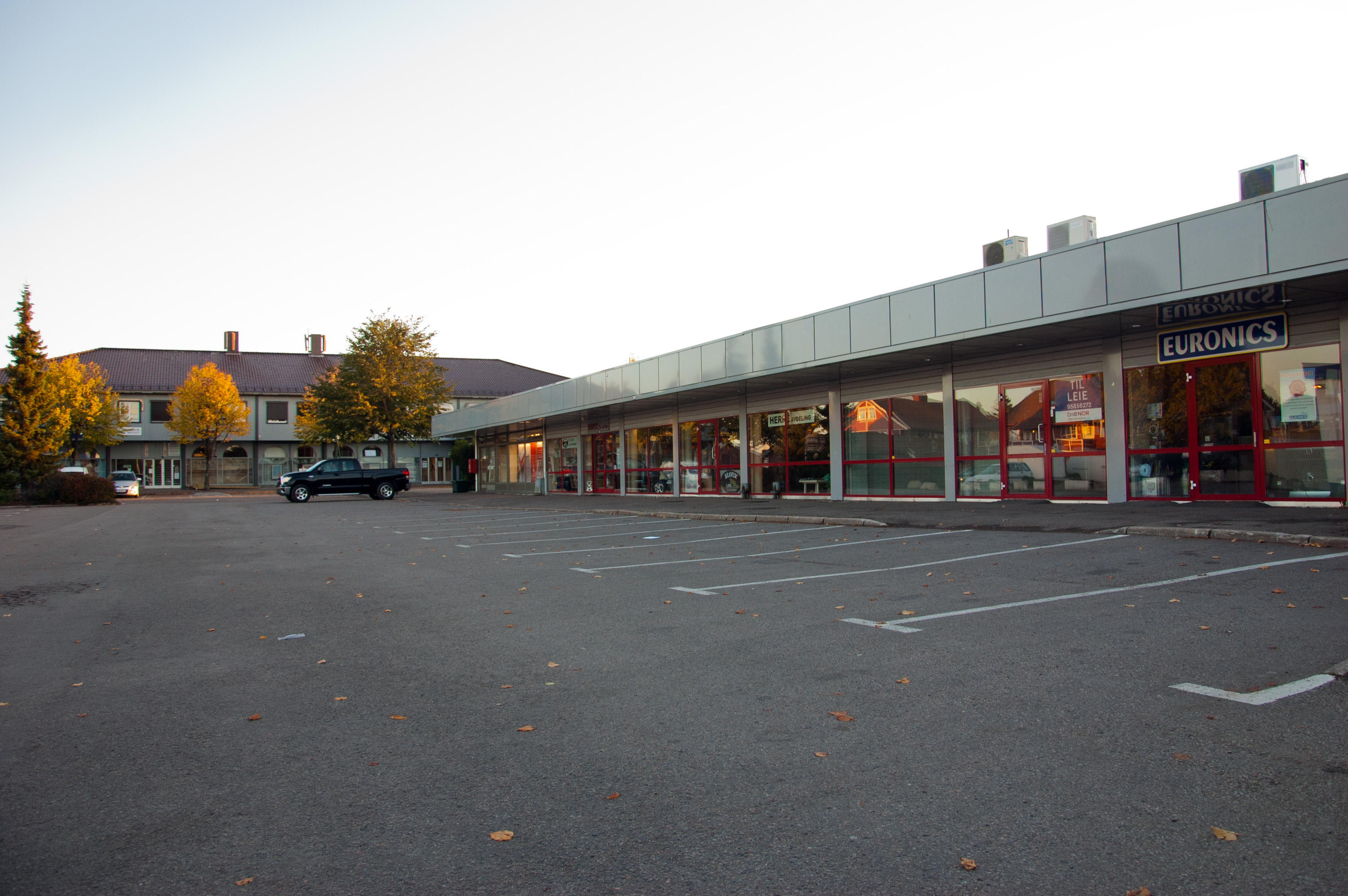 Tolvsrødsenteret på Tolvsrød i Tønsberg.